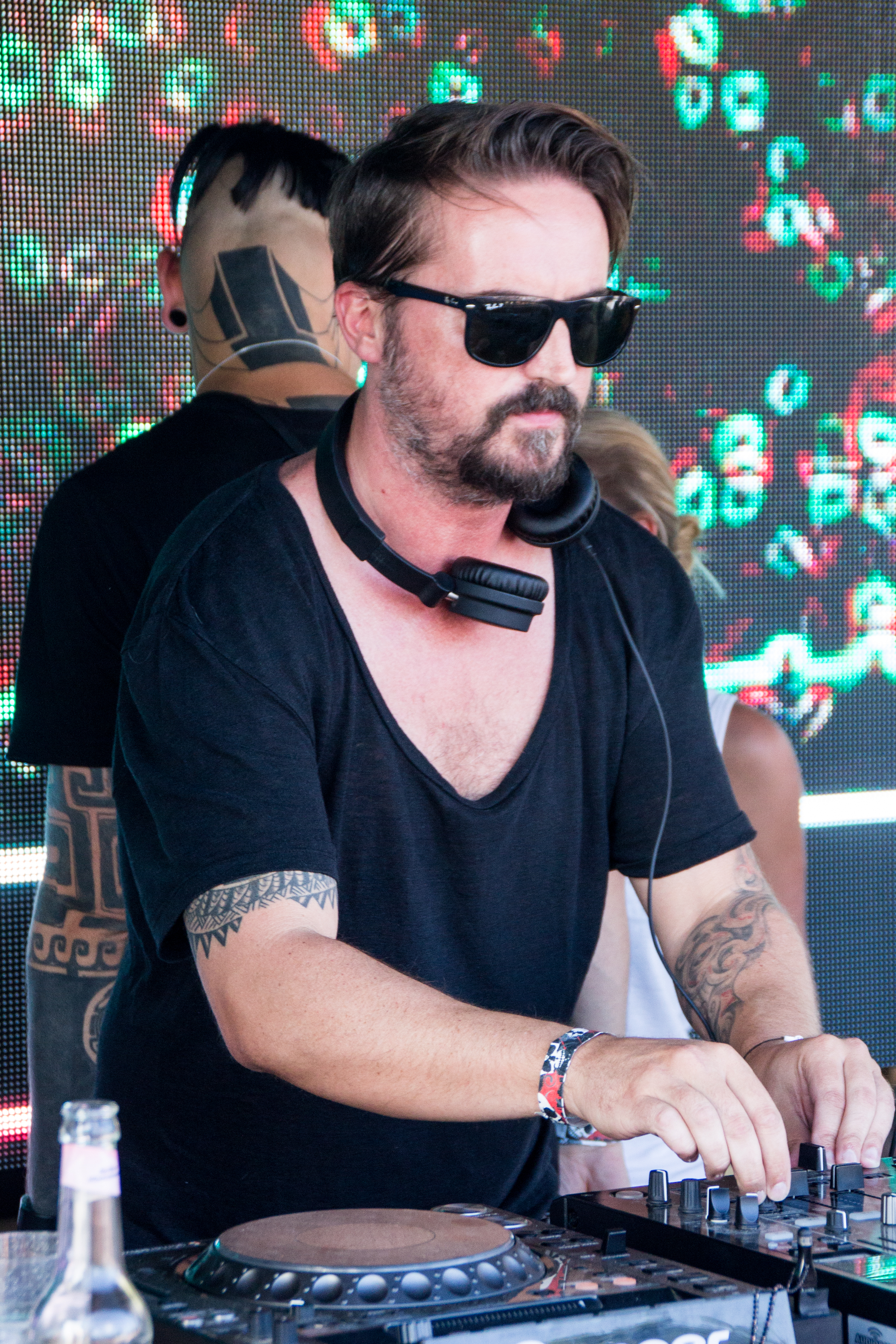 Sascha Braemer - Dieses Bild ist auf dem Sterne & Bass Tages-Festivals vom 9. August 2015 das in Berlin-Rummelsburg entstanden.